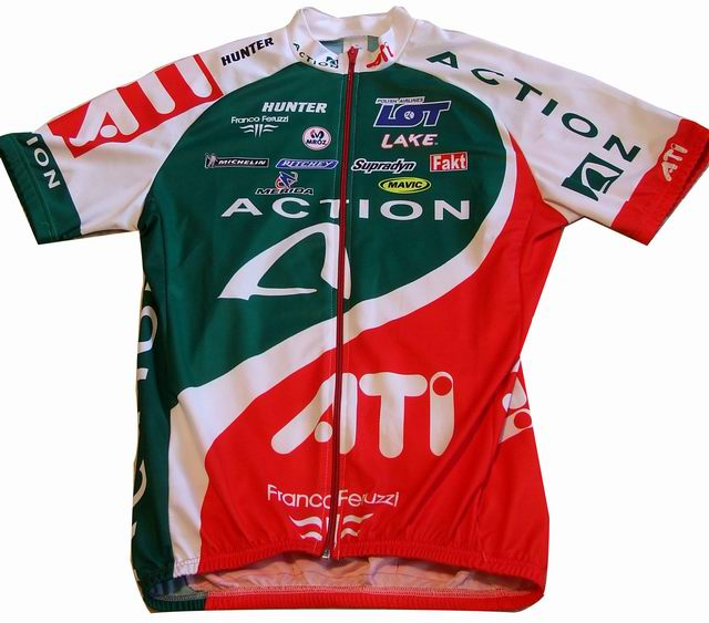 Koszulka kolarska grupy Action ATI z 2004 roku